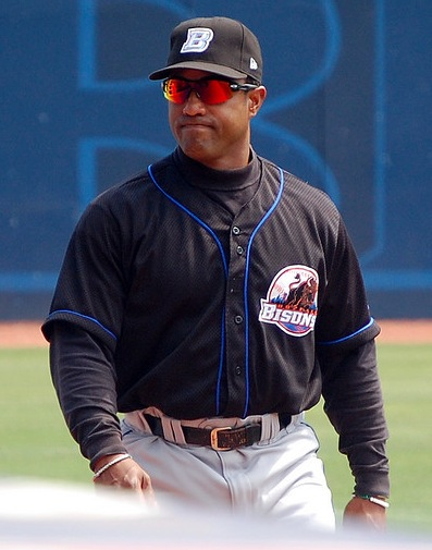 Ricky Bones